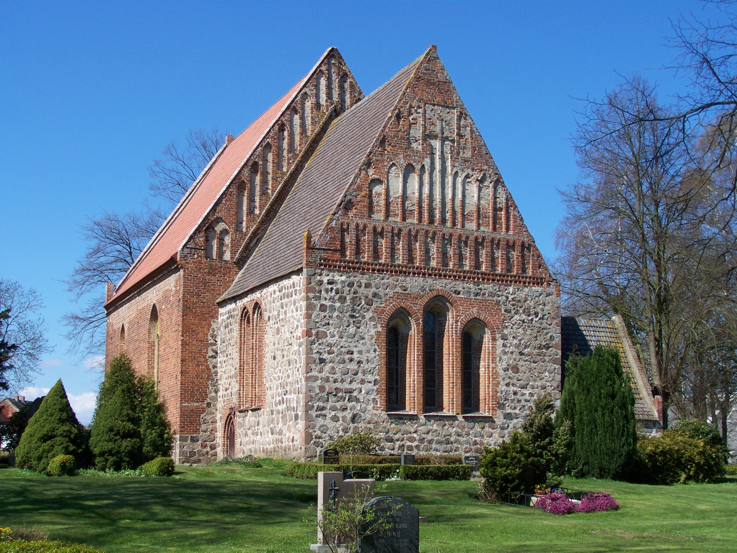 Vorland, Kirche - Ansicht auf Chor und Schiff (2008-04-20)